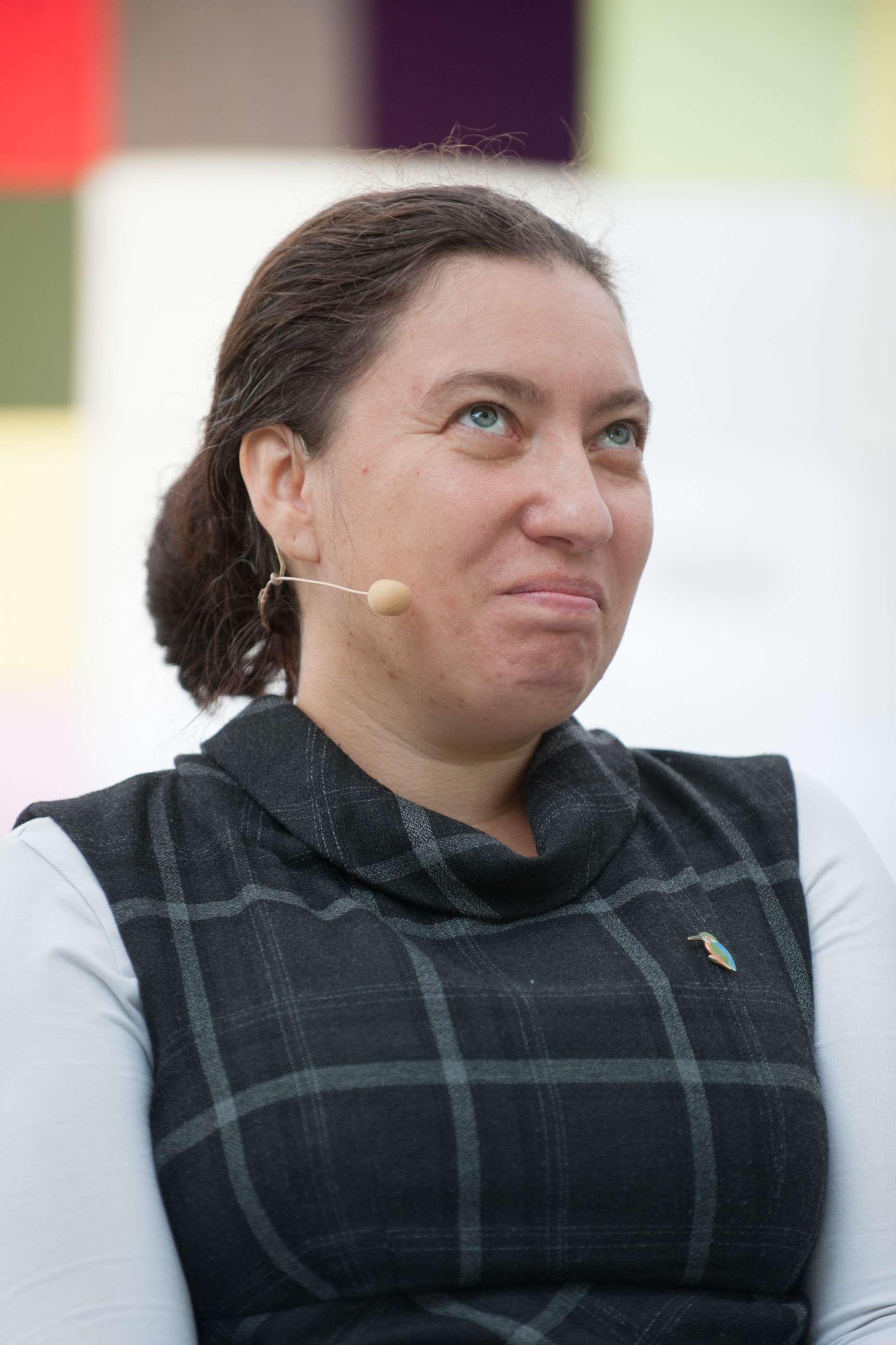 Arvamusfestival 2014: "Mida teha meie maavaradega"